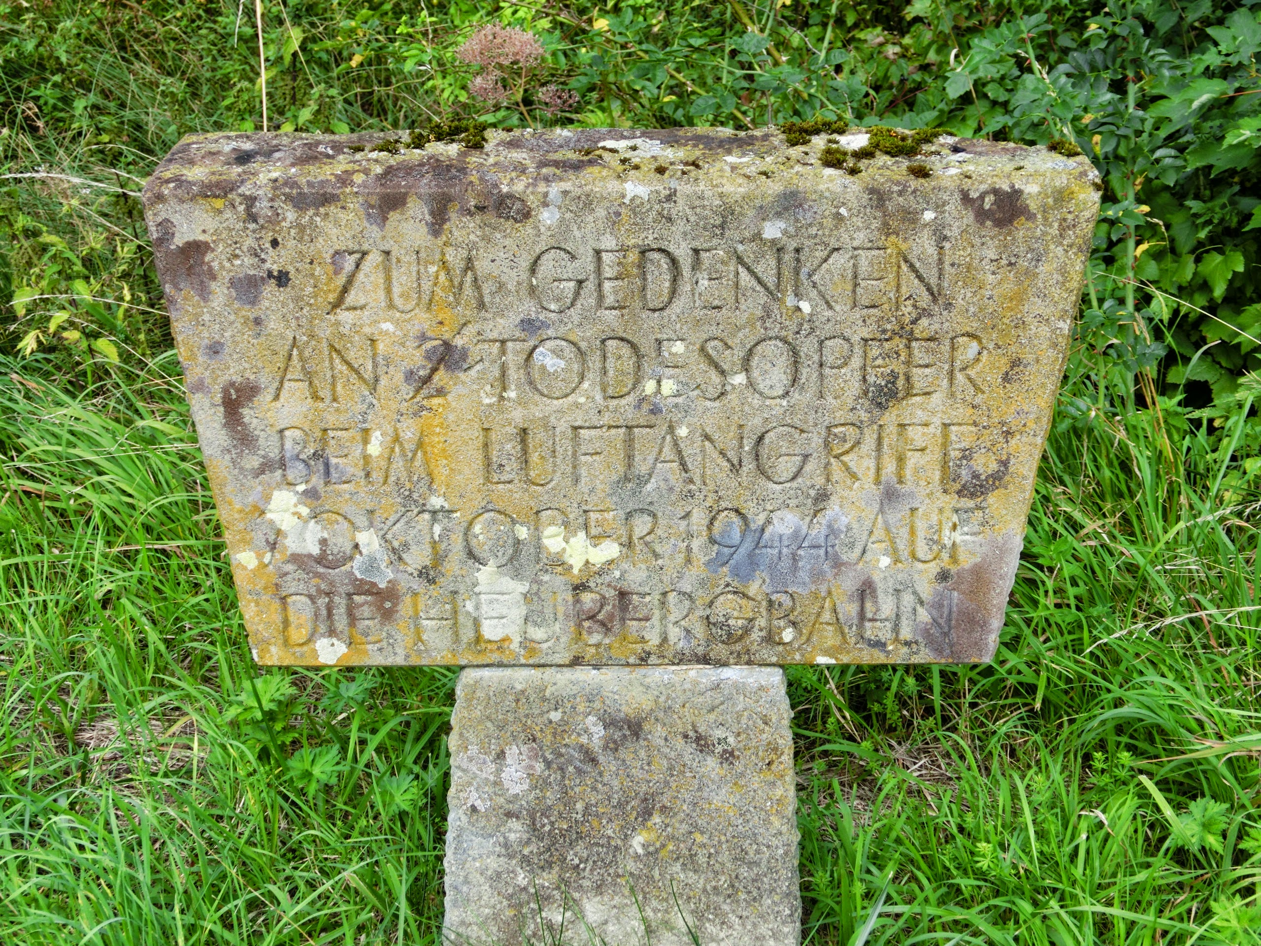 Deutschland - Baden-Würtemberg: Gedenkstein für zwei Todesopfer durch den Luftangriff auf die ehemalige Heubergbahn am 7. Oktober 1944